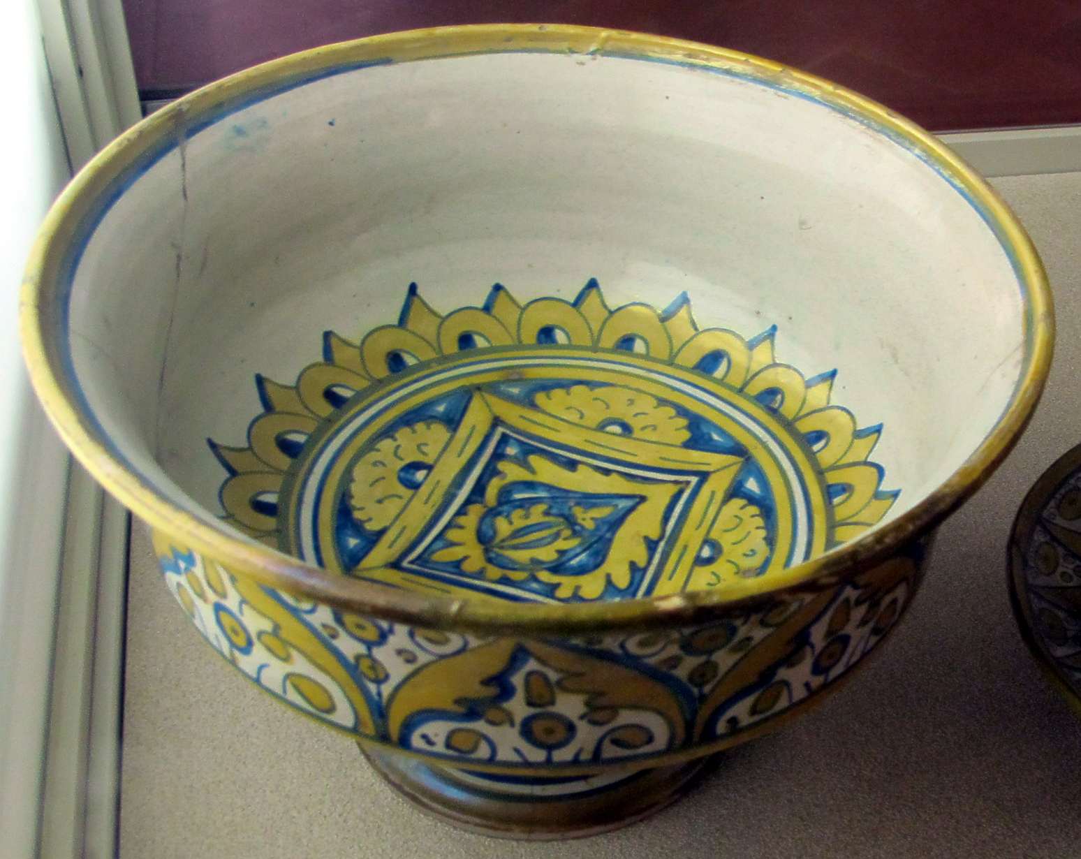 Museo Nazionale d'Arte Medievale e Moderna - MIBAC This is a photo of a monument which is part of cultural heritage of Italy.